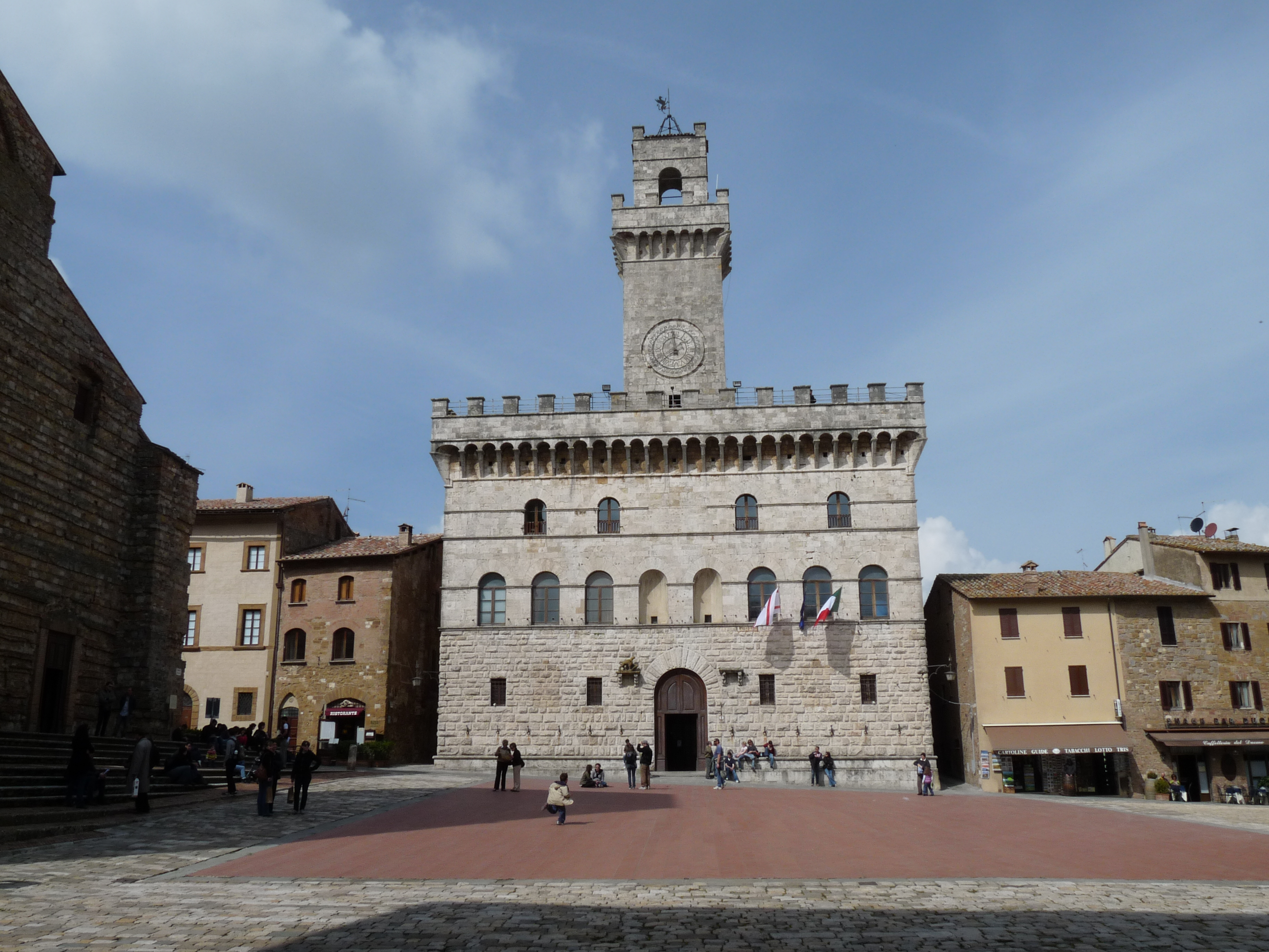 Montepulciano es una ciudad renacentista de gran interés que está situada en el centro de Toscana, al sur de la provincia de Siena. Se alza sobre una colina con una bellísima posición panorámica, a 605 metros de altura sobre el nivel del mar. La zona goza de reconocimiento internacional a causa de sus extraordinarios vinos tintos, siendo el Vino Nobile de Montepulciano el de mayor fama. De hecho, hay muchas buenas bodegas donde degustar los vinos locales, acompañados de excelentes productos gastronómicos lugareños. Piazza Grande: Es una plaza monumental que, entre otros edificios, alberga la espléndida sede del Ayuntamiento. De estilo gótico, se construyó en el siglo XIII. En el siglo XV, el arquitecto Michelozzo la remodela y le añade una gran torre. Desde lo alto se dominan los valles de Orcia y Trasimeno, así como la localidad de Radicofani.